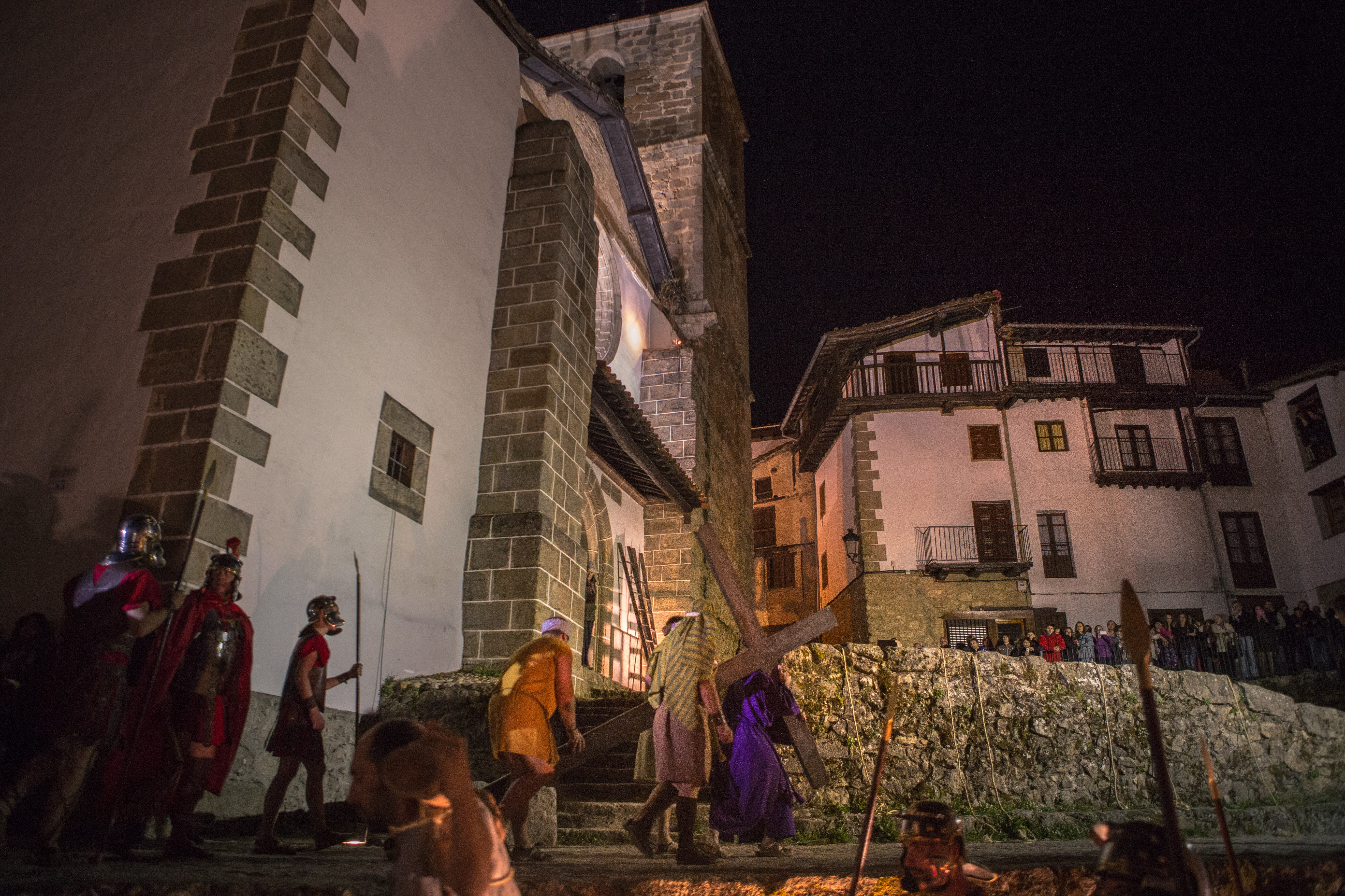 Semana Santa de Candelario This is a photography of a Folklore festival in Spain (Wikidata id Q47128318).